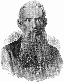 Mayor general Francisco Vicente Aguilera